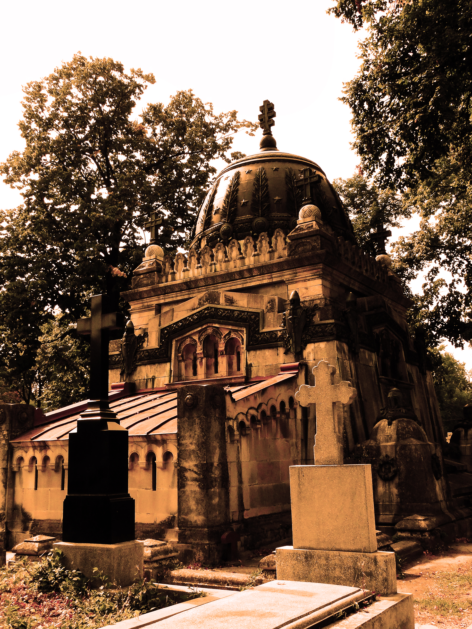 Cavoul familiei Gheorghe Grigore Cantacuzino 175